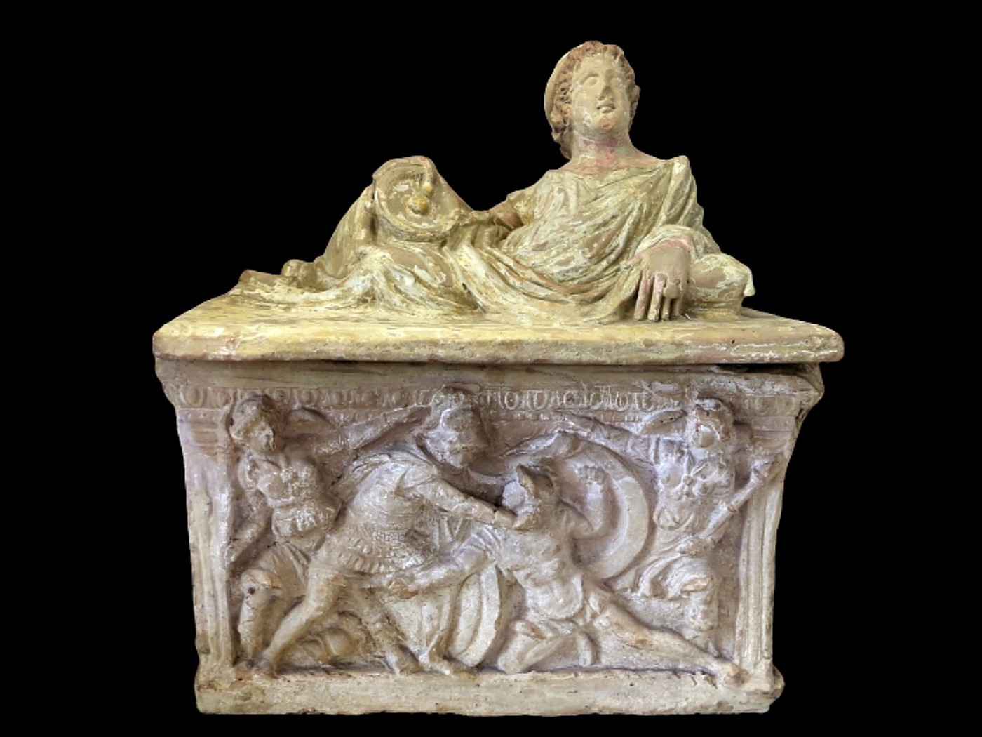 Collections of the Museo archeologico nazionale (Parma)